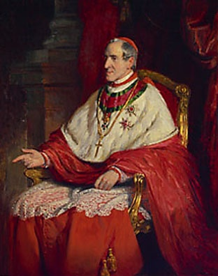 Kardinal Joseph Othmar Rauscher (1797-1875) sitzt auf einem mit rotem Brokatstoff bespannten Lehnstuhl, die rechte Hand im Zeigegestus stützt sich auf die Armlehne. Auf seiner Brust trägt er das Großkreuz des österreichischen Leopoldordens und jenes des ungarischen Stephansordens zusammen mit dem grün-roten Band des selben, der damals höchsten Auszeichnung des Staates.